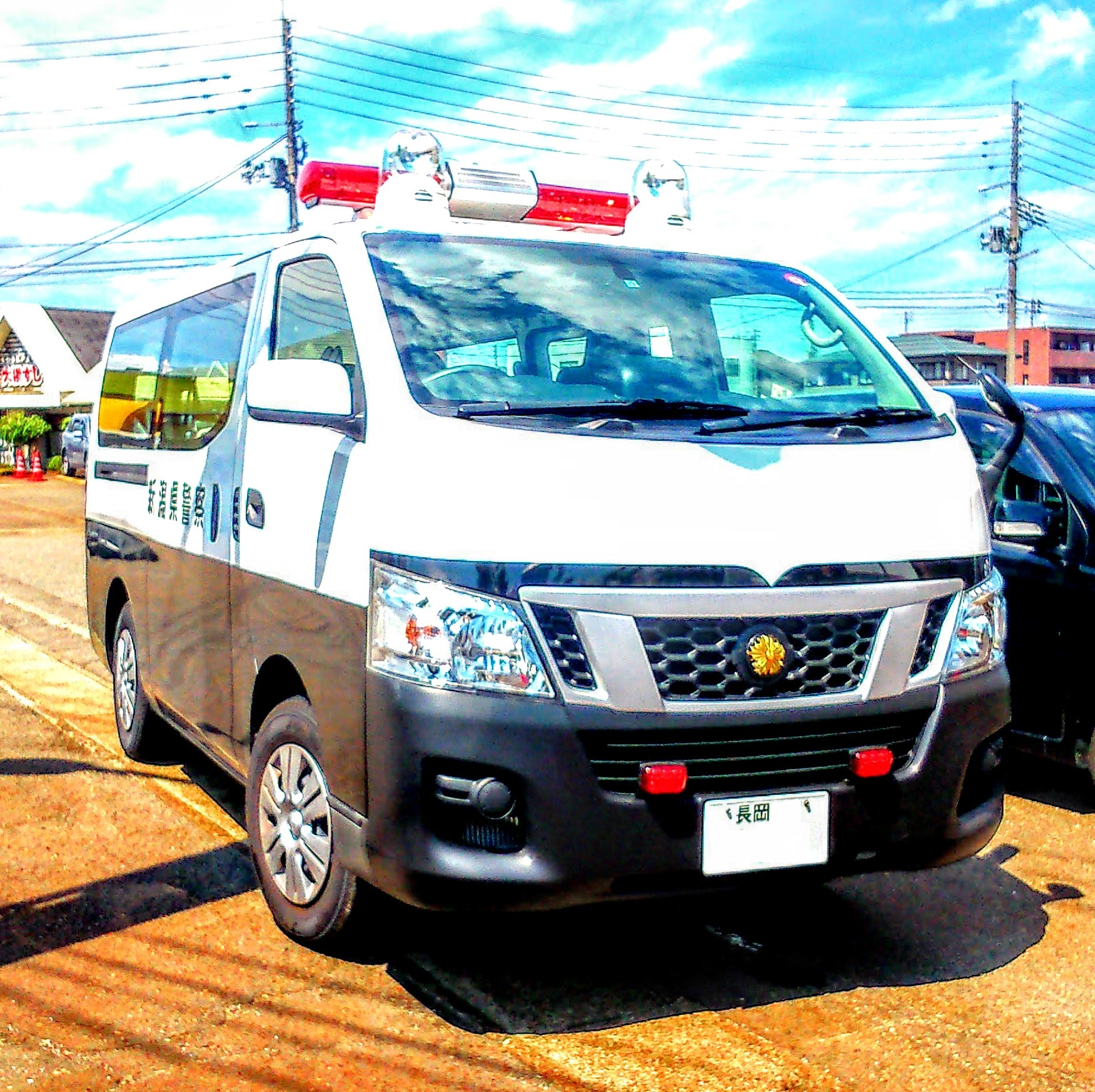 新潟県警察（長岡警察署）の交通課に所属する警察車両。日産キャラバン。長岡市にて。